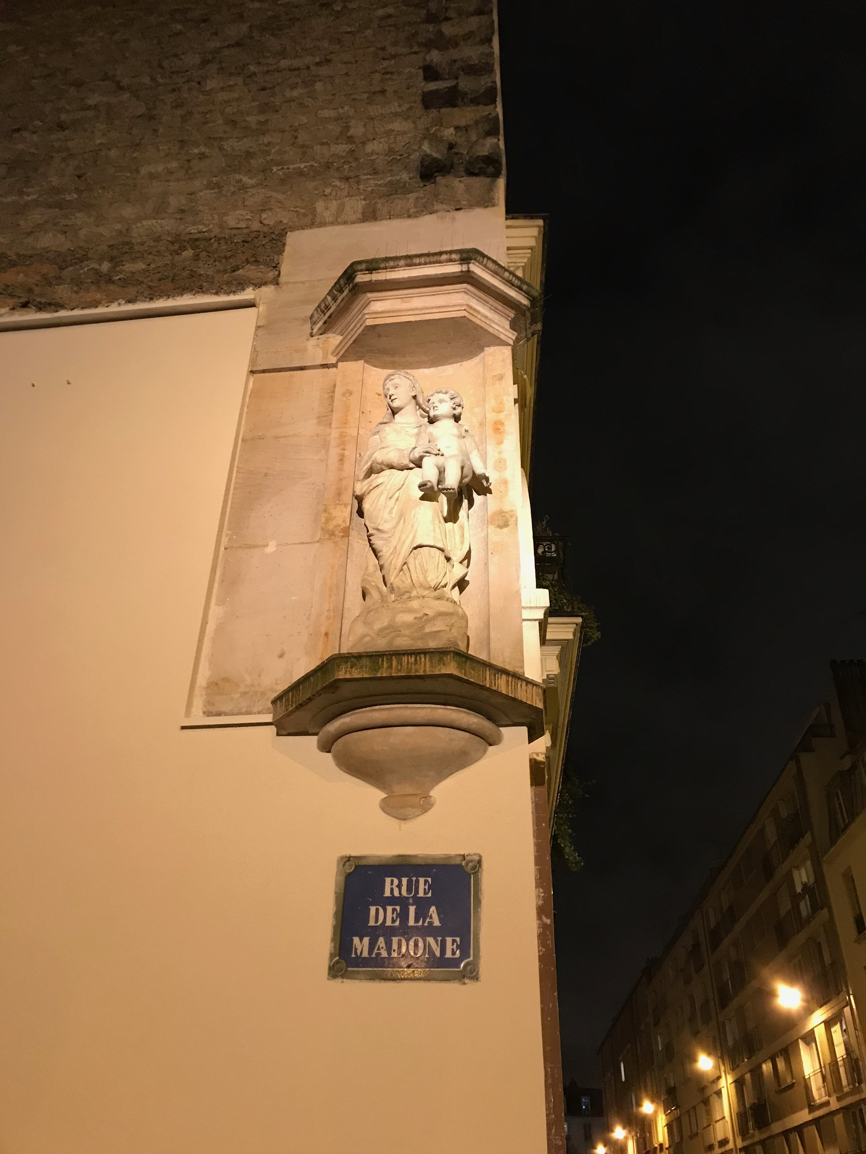 Statue de la Vierge Marie, rue de la Madone, Paris.